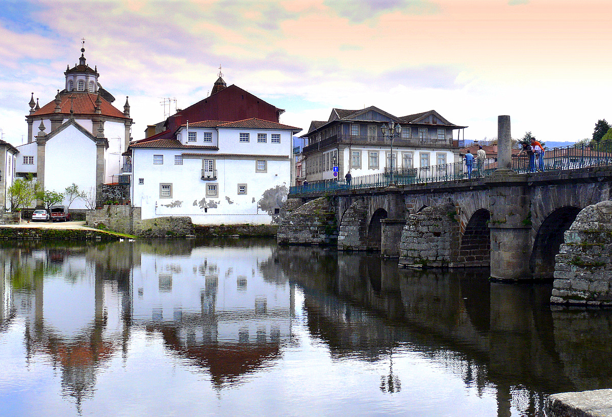 Ponte Romana de Chaves (antiga Acquae Flaviae)